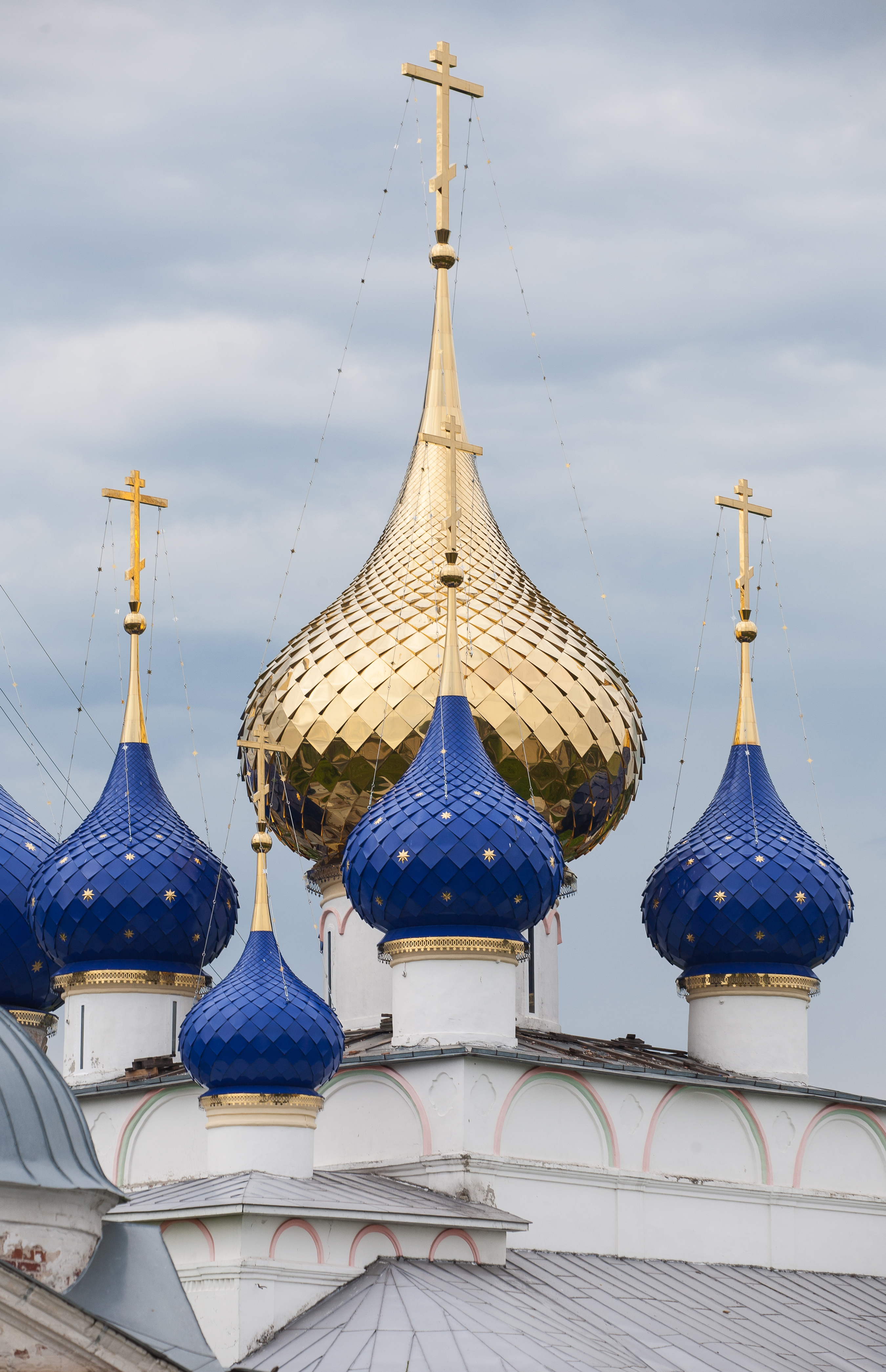 Церковь Преображения Господня в Пурехе. Кирпичный двухэтажный храм, хороший образец каменного зодчества Среднего Поволжья 1-й половины XVII века Заложен во 2-й четверт XVII века князем Д. М. Пожарским, окончен в середине XVII века. Четырехстолпный пятиглавый четверик основного храма с трёхчастным алтарем и вынесенным на восток алтарём нижней церкви первоначально с трёх сторон окружала обходная галерея. С юго-востока к храму примыкал одноглавый четверик придела Макария Желтоводского, с северо-запада шатровая колокольня. В 3-й четверти XVII века сооружён северный Предтеченский придел. При перестройке в 1875—1880 годы северный придел, западная галерея и колокольня разобраны, сооружены новый одноглавый северный Успенский придел, четырехстолпная трапезная и массивная колокольня в три яруса под каркасным шатром. В дьяконнике алтаря главного храма помещался придел Евфимия Суздальского, внизу — тёплый Успенский храм с правым Воскресенским (первоначально — Александра Свирского) приделом, под трапезной был устроен Воздвиженский придел. Закрыт в 1935 году. Реставрировался с 1989 года, в 1991 году возвращен верующим. Вид с северо-востока.